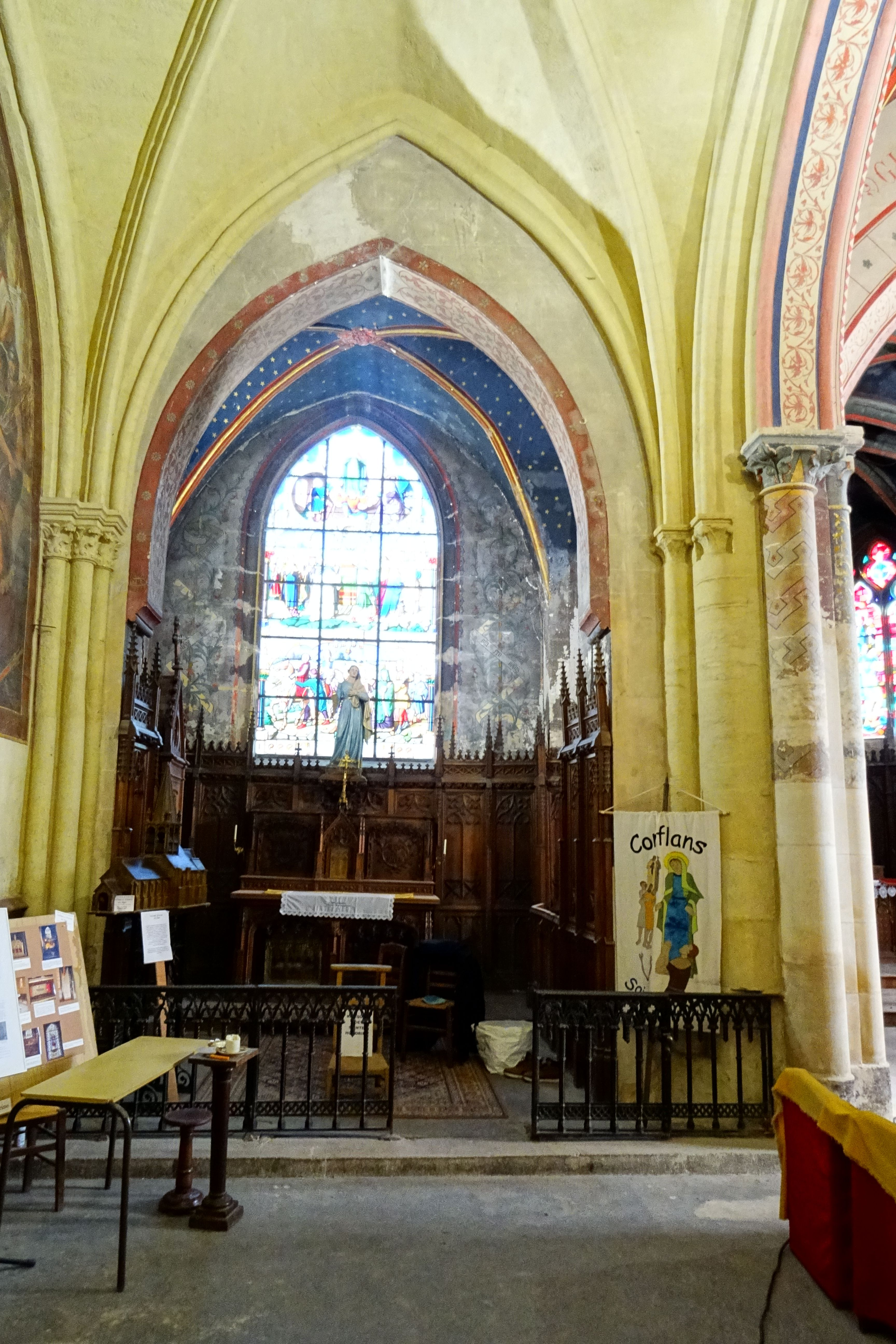 Intérieur de l'église - voir le titre du fichier.